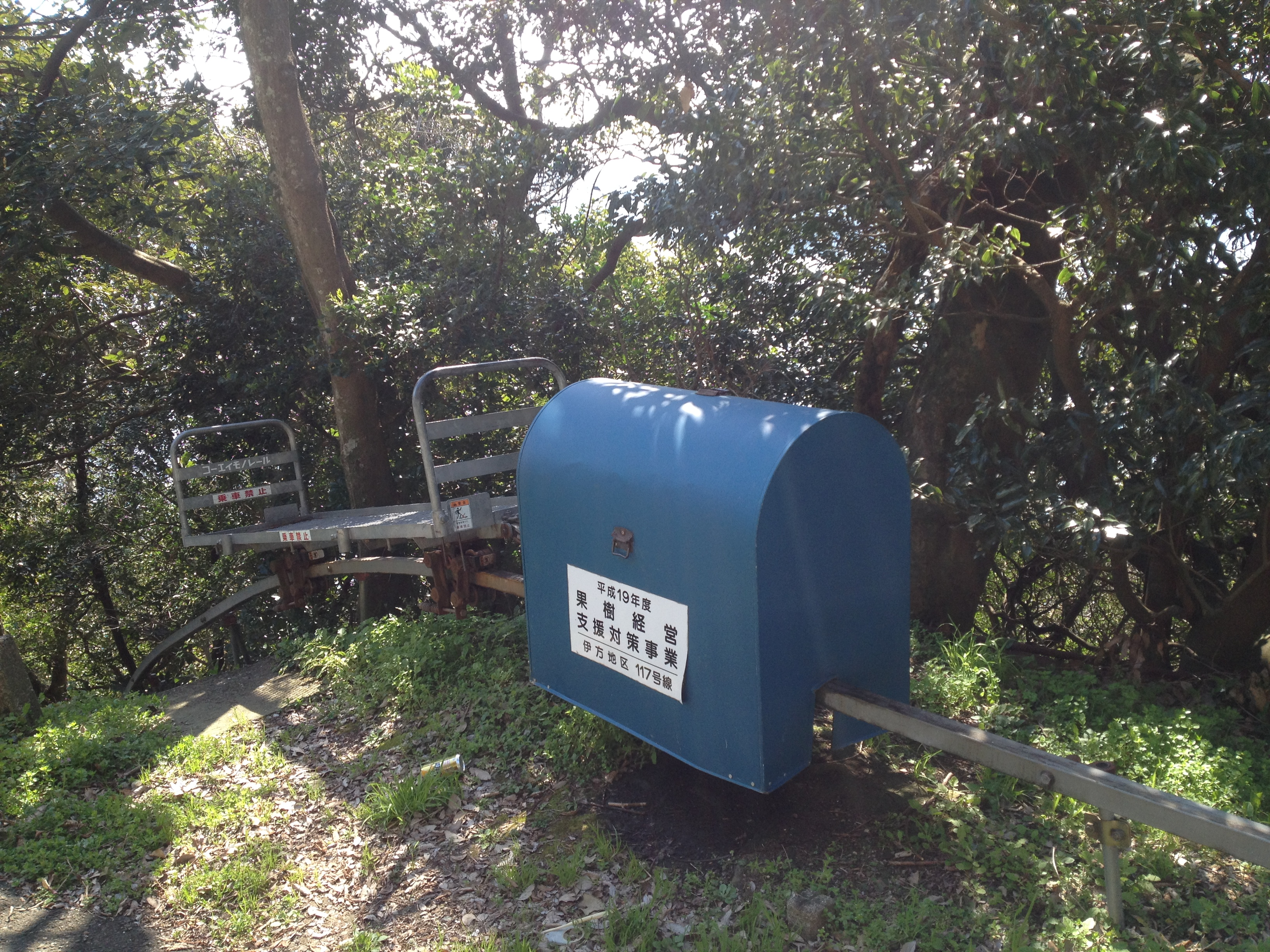 train for mikan harvest, Sadamisaki